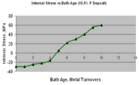 schéma electroless nickel